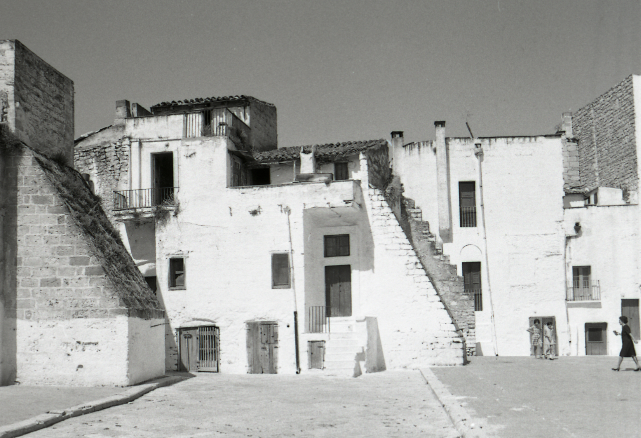 Servizio fotografico : Sannicandro di Bari, 1970 / Paolo Monti. - Strisce: 5, Fotogrammi complessivi: 27 : Negativo b/n, gelatina bromuro d'argento/ pellicola ; 35 mm. - ((I fotogrammi hanno una doppia numerazione. . - Sul portanegativi: Nikmat FP4. - Sul dorso del portanegativi Monti specifica: "Gruppo case bianche". - Occasione: Documentazione per la pubblicazione di: Calò Mariani Maria Stella, "L'arte del duecento in Puglia", Torino, Istituto Bancario San Paolo, 1984. - Fonte: Agenda di Paolo Monti: Monti - Agenda 1970 (1970), presso Archivio Paolo Monti